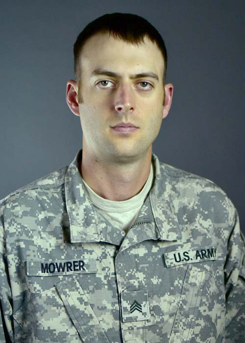 SGT Nick Mowrer